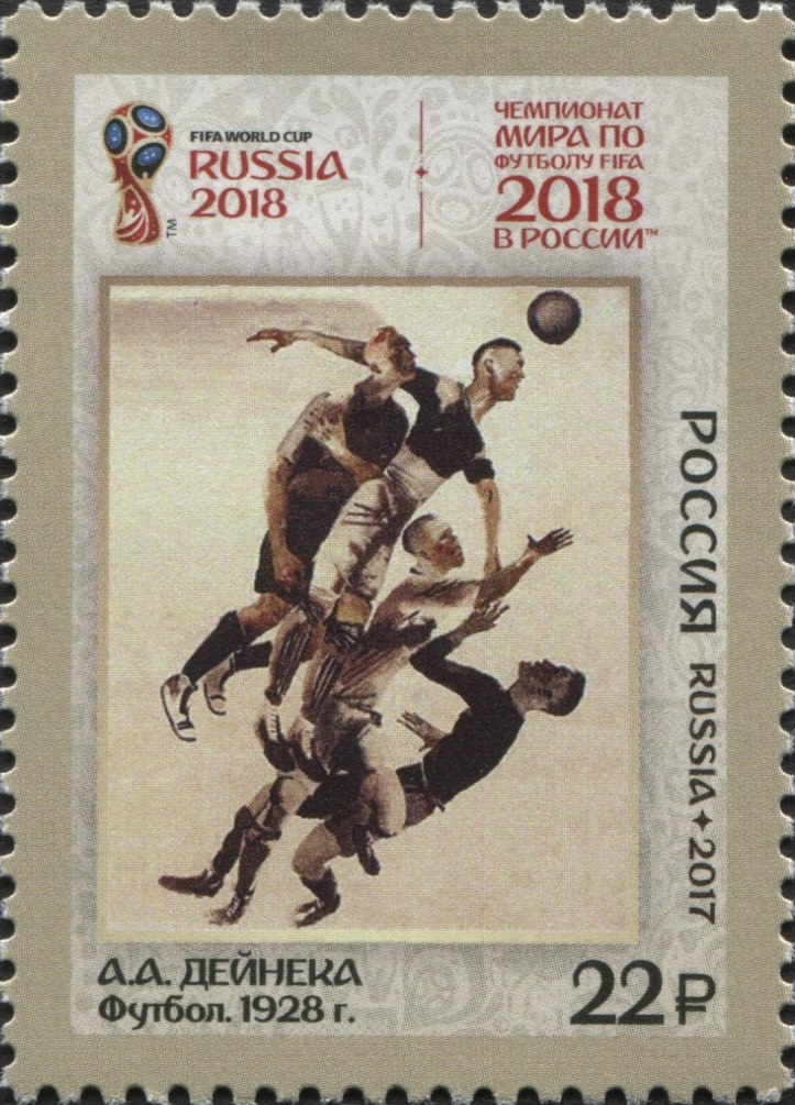 Почтовая марка России, выпущенная 20 декабря 2017 года, из серии «Чемпионат мира по футболу FIFA 2018 в России™. Футбол в искусстве». На марке помещена репродукция картины А.А. Дейнеки «Футбол» (1928 год). Дизайнер — О. Шушлебина. Номер по каталогу — 2305.